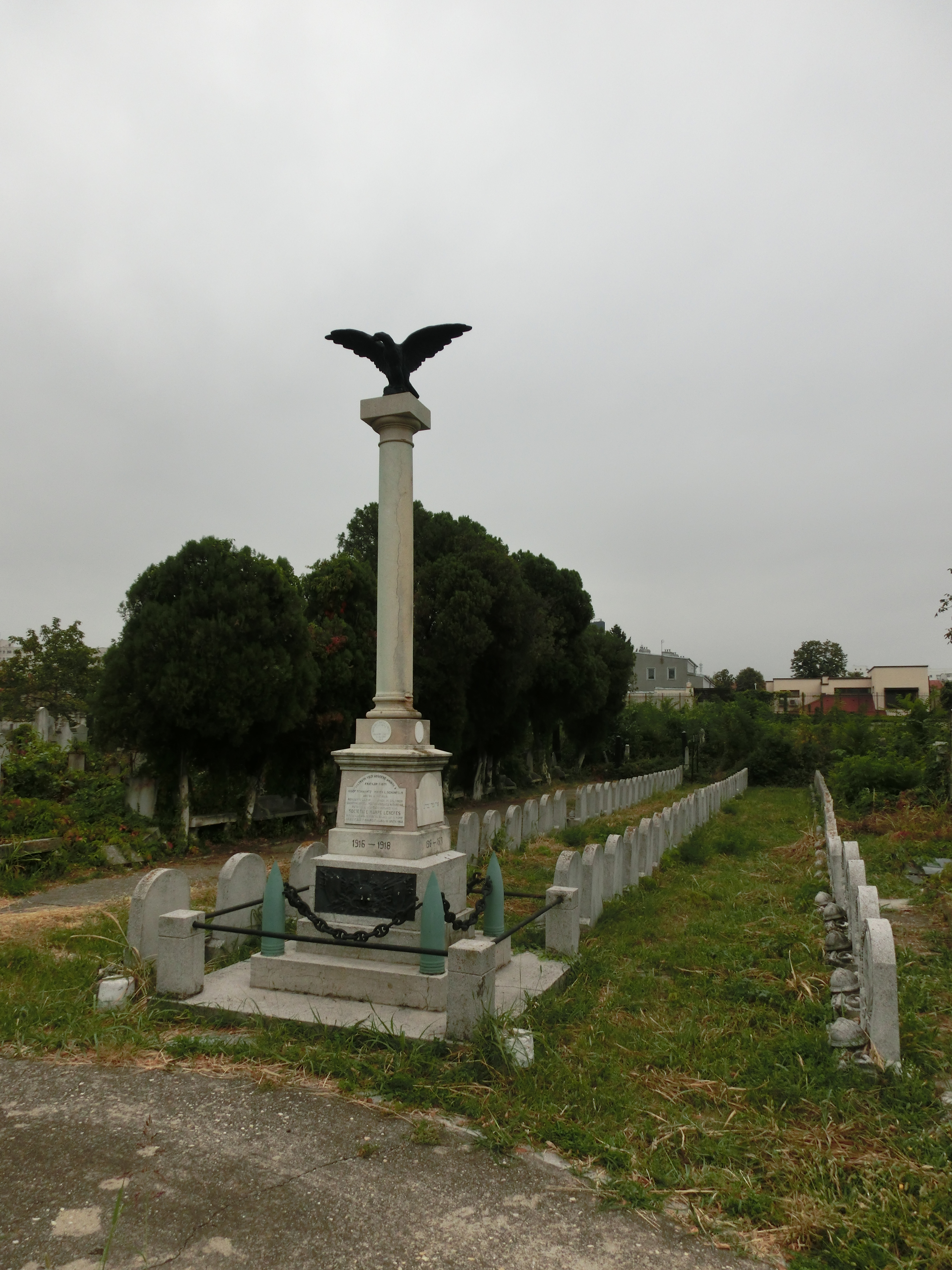 Monumentul eroilor din 1916-1918